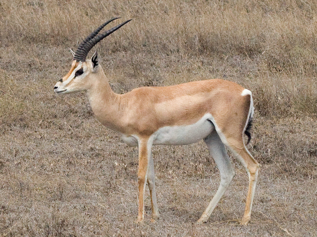 Nanger granti (synonym Gazella granti)